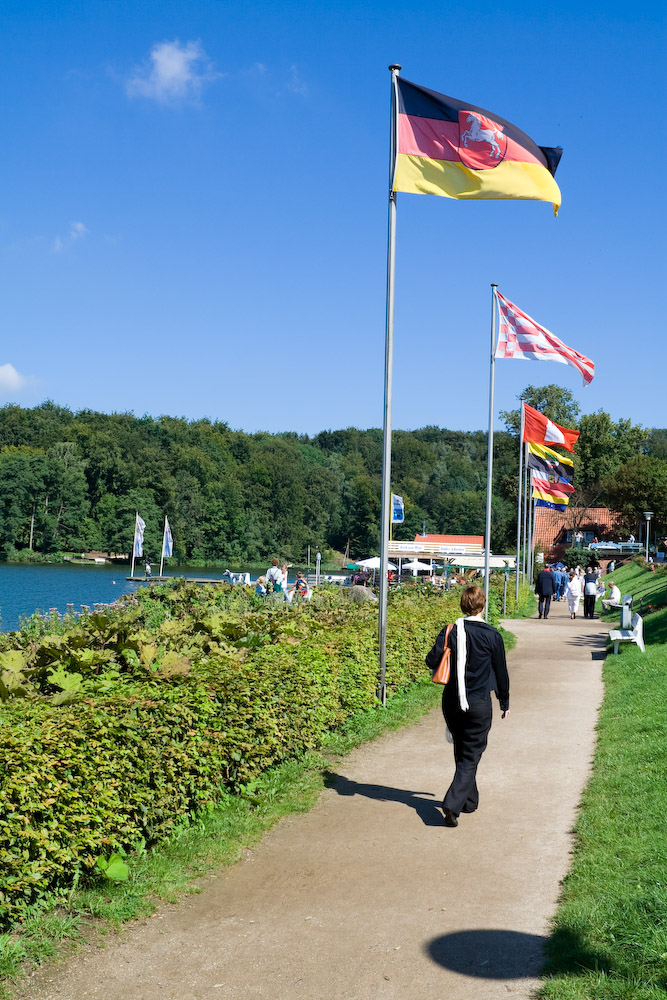 Malente am Dieksee